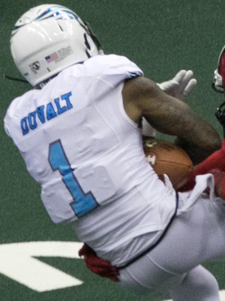 Valor 47 / Philadelphia Soul 48